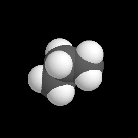 Raumfüllendes Molekülmodell für Propan Kalottenmodell Propan / space filling model propane